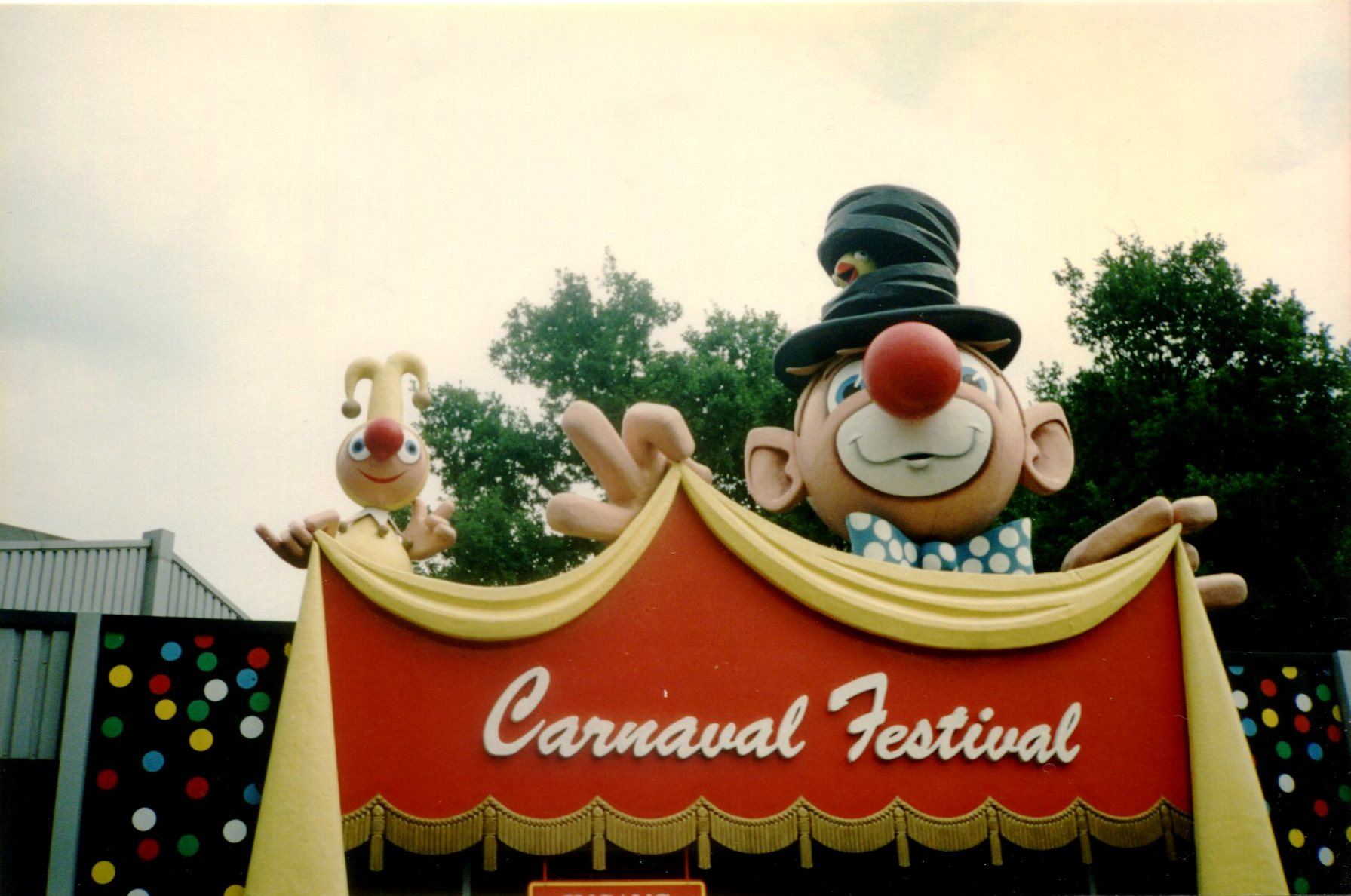 EftelingCarnaval